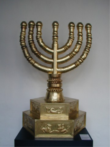 goldener Leuchter, Rekonstruktion